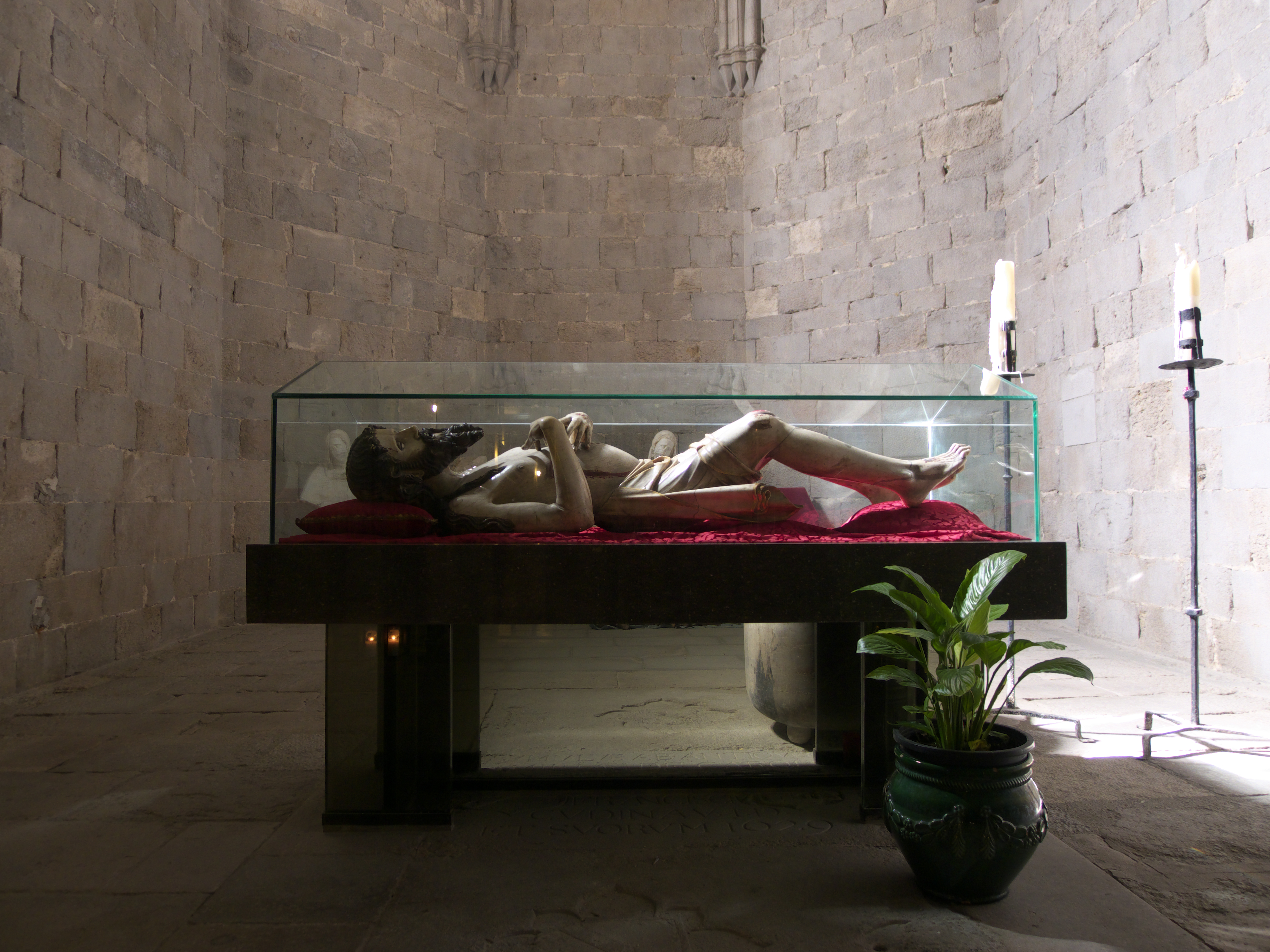 Capilla del Corpus Christi, Iglesia de San Félix (Gerona). La escultura gótica en Cataluña. Aloi de Montbrai y Jaume Cascalls lideran el primer taller gótico afincado en Gerona.